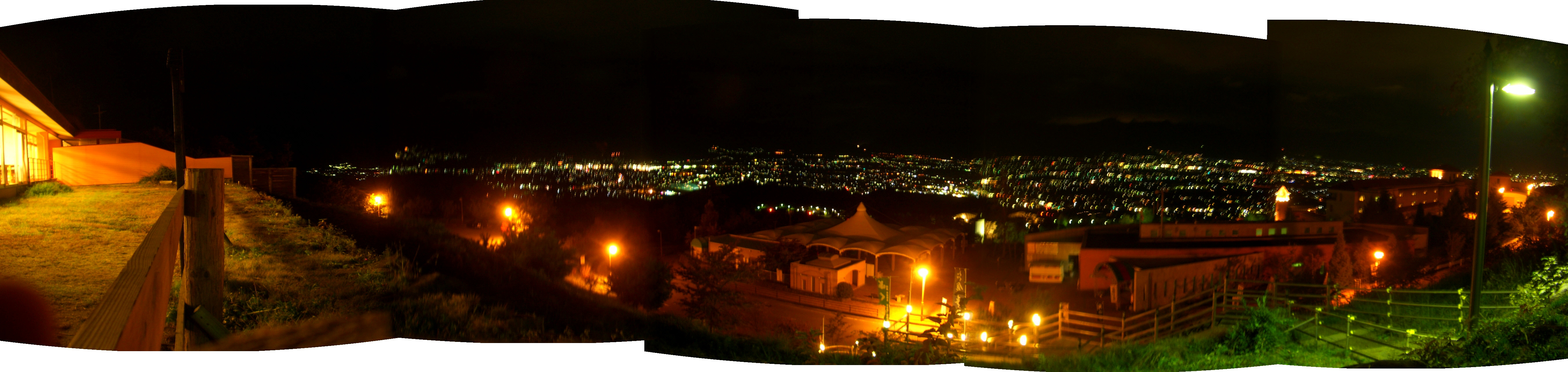 赤松の湯ぷくぷくからのパノラマ夜景